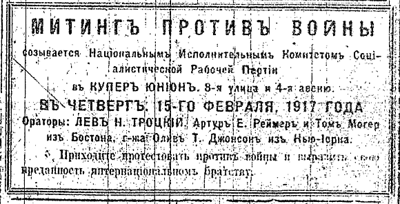 Объявление о митинге в Copper Union (NY City); оратор: Лев Давидович Троцкий